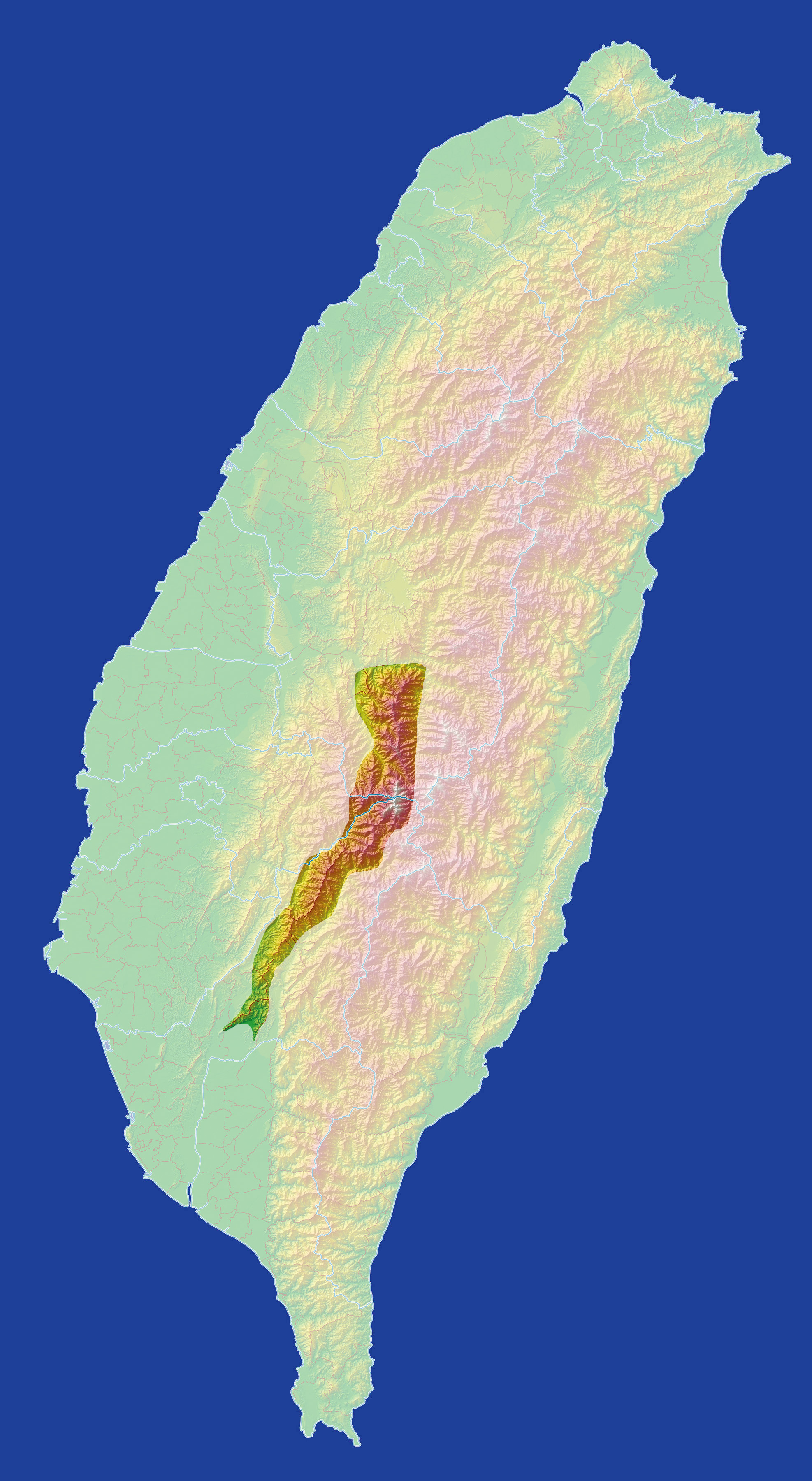 Map of Yushan Range, Taiwan